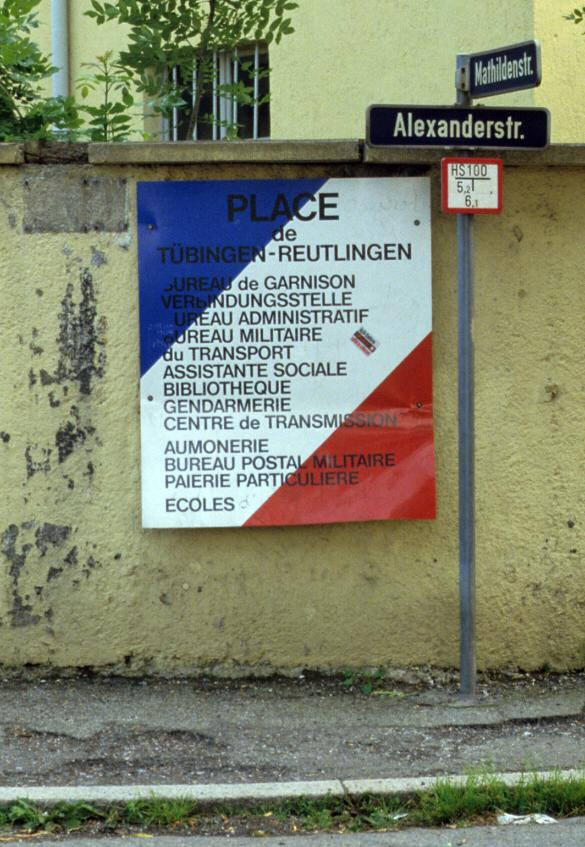 Hinweisschild an der Place de Tübingen-Reutlingen (d.h. Ecke Mathilden- und Alexanderstraße), dem ehemaligen Zentrum der französischen Garnisonsstadt.